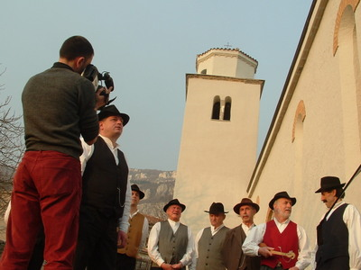 Art050323